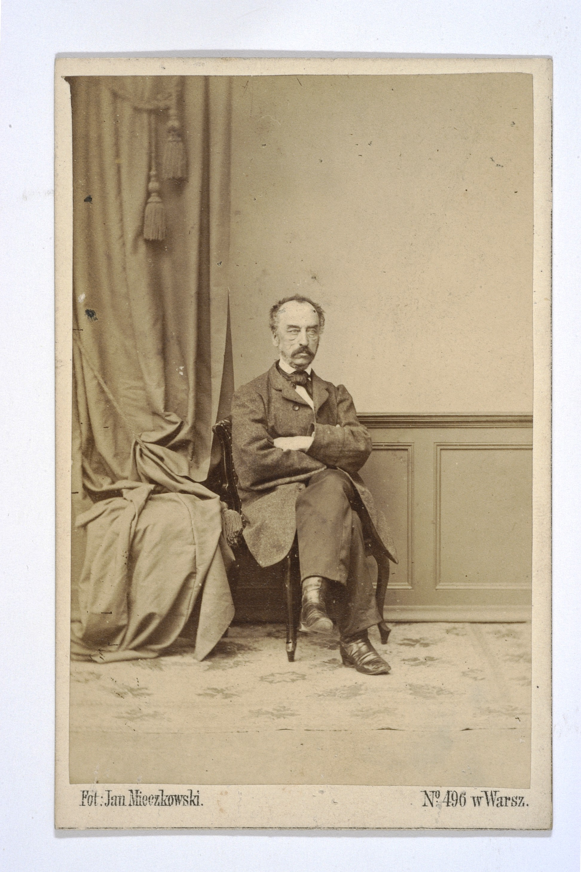 Portret Kazimierza Władysława Wójcickiego, fot. Jan Mieczkowski, ok. 1865